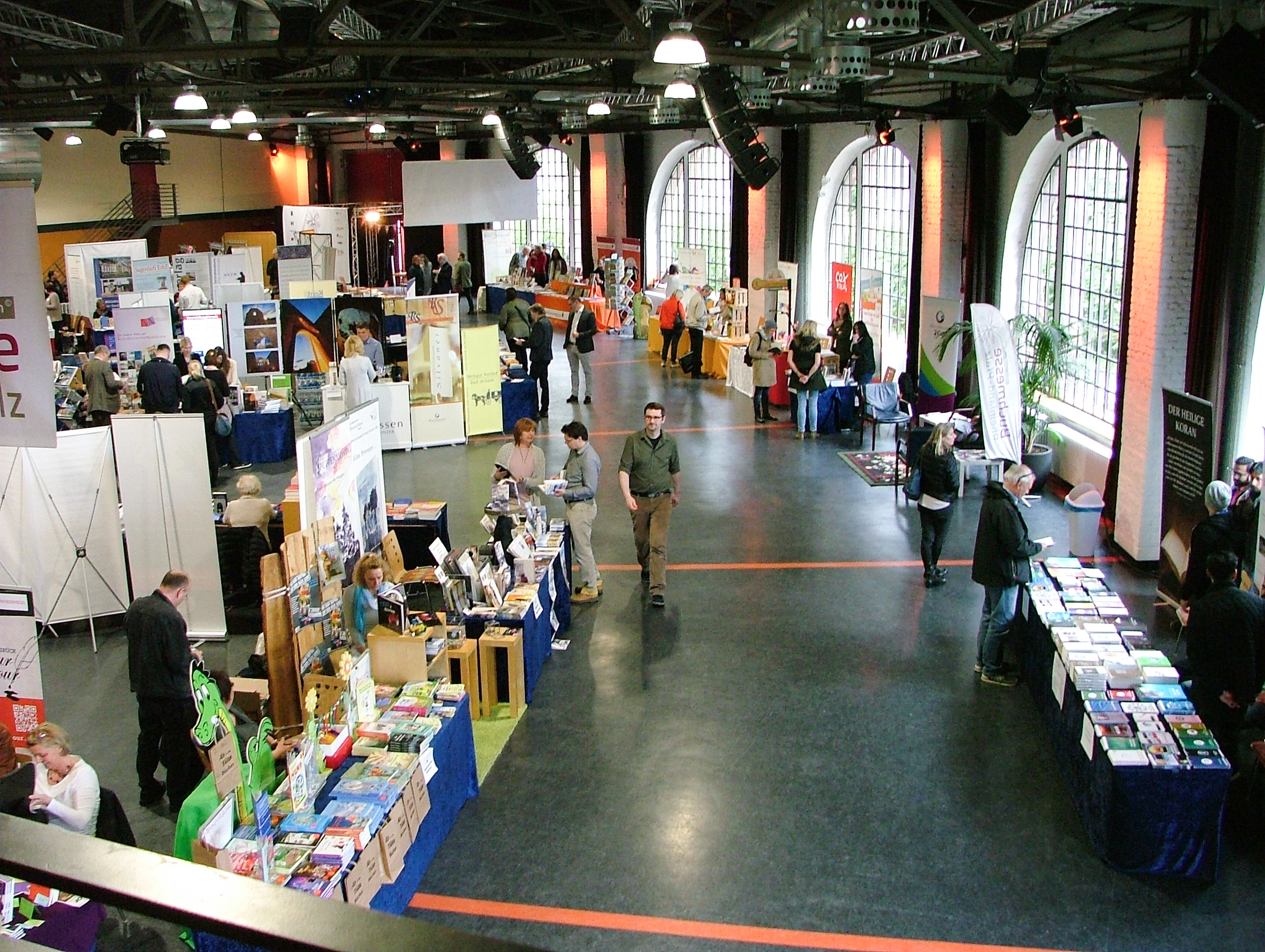 Buchmesse Rheinland-Pfalz 2016 (22.-24. April) in der Alten Lokhalle in Mainz